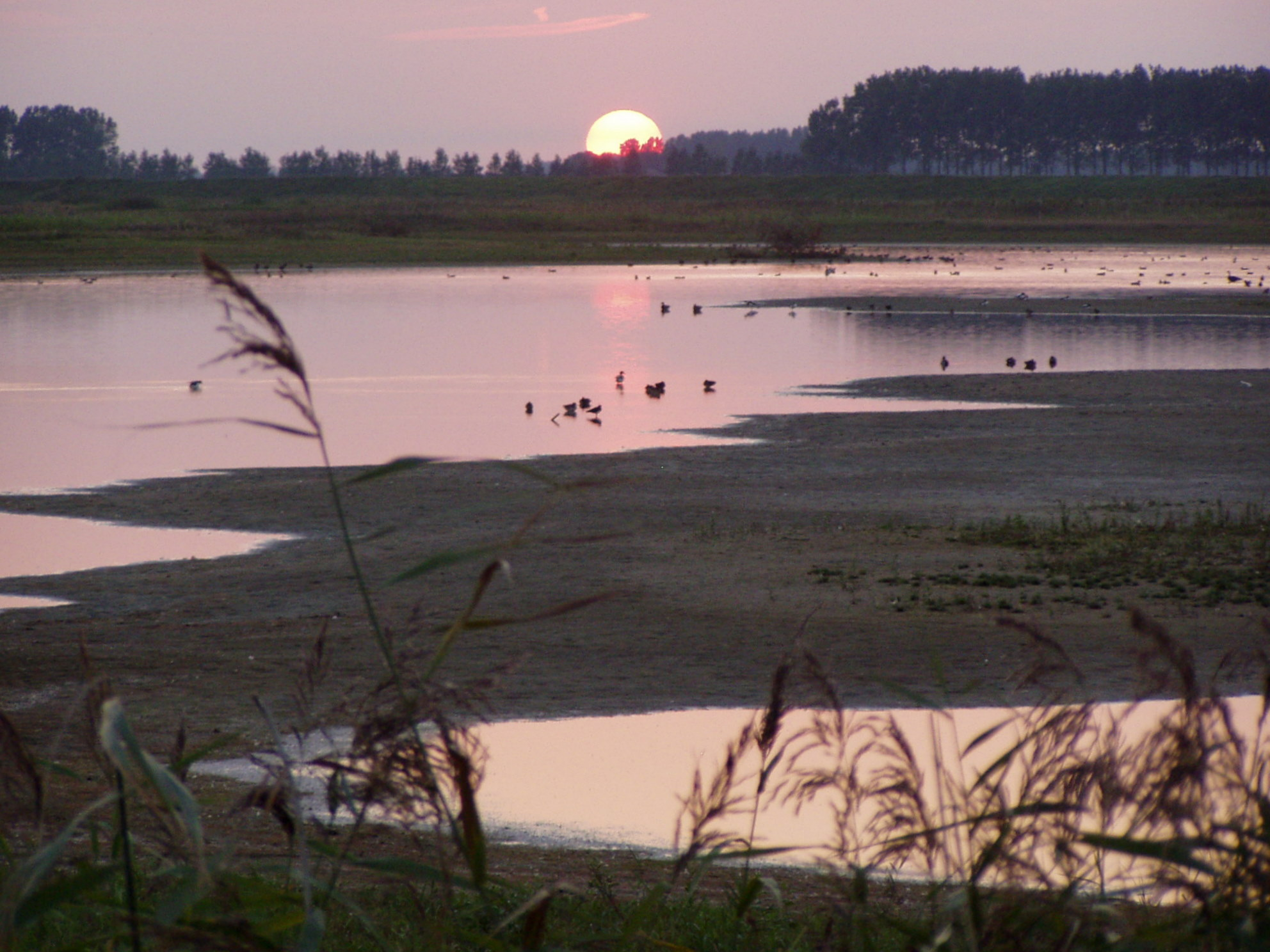 zonsondergang in de Braakman